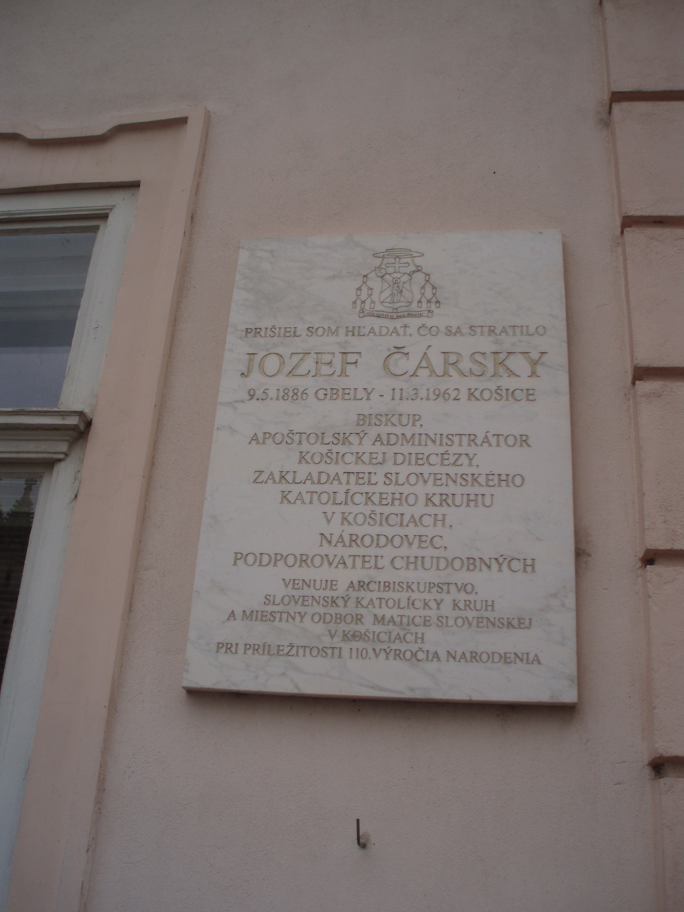 Csárszky József emléktáblája Kassán a Fő utcában